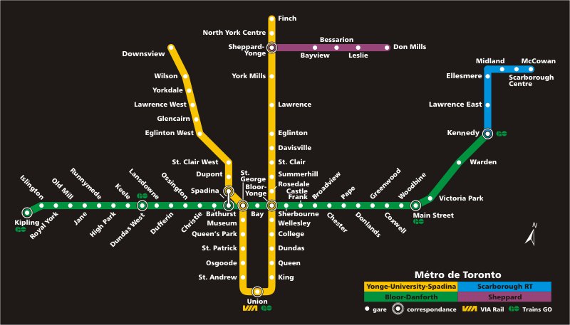 Un plan du métro de Toronto (2005).